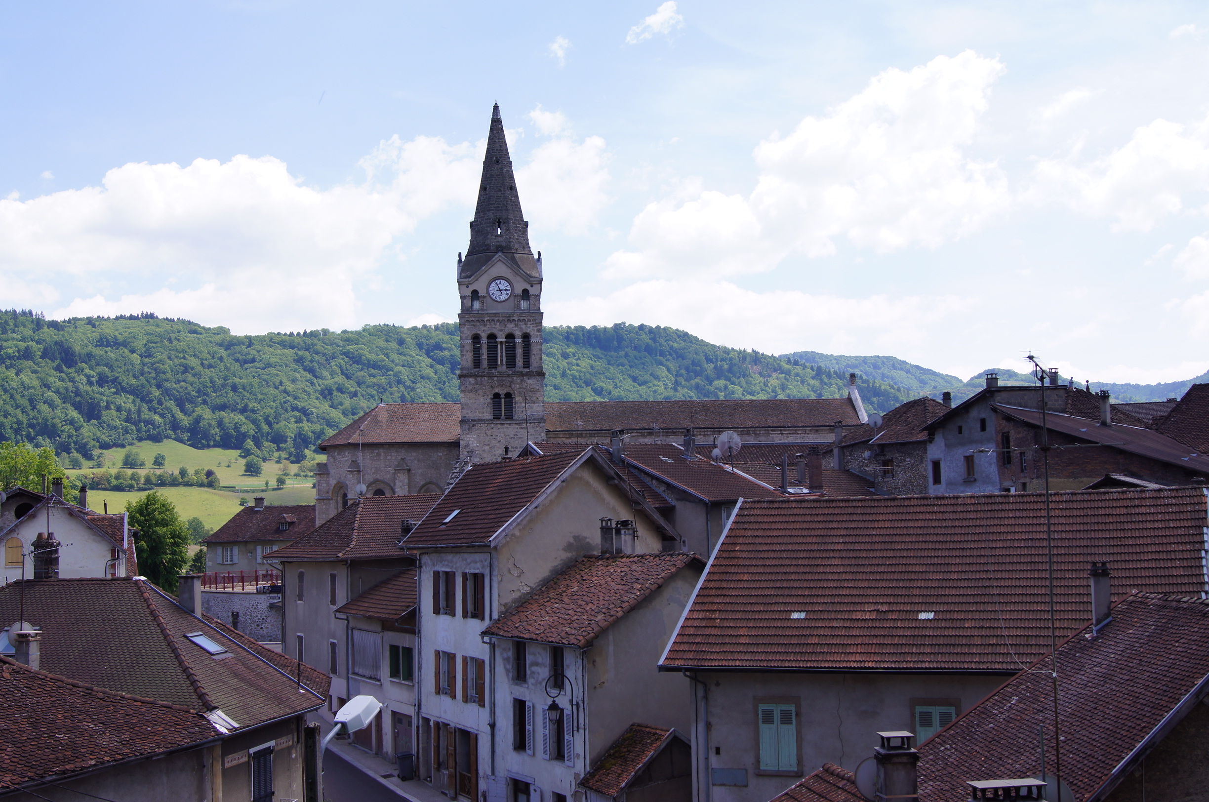 église